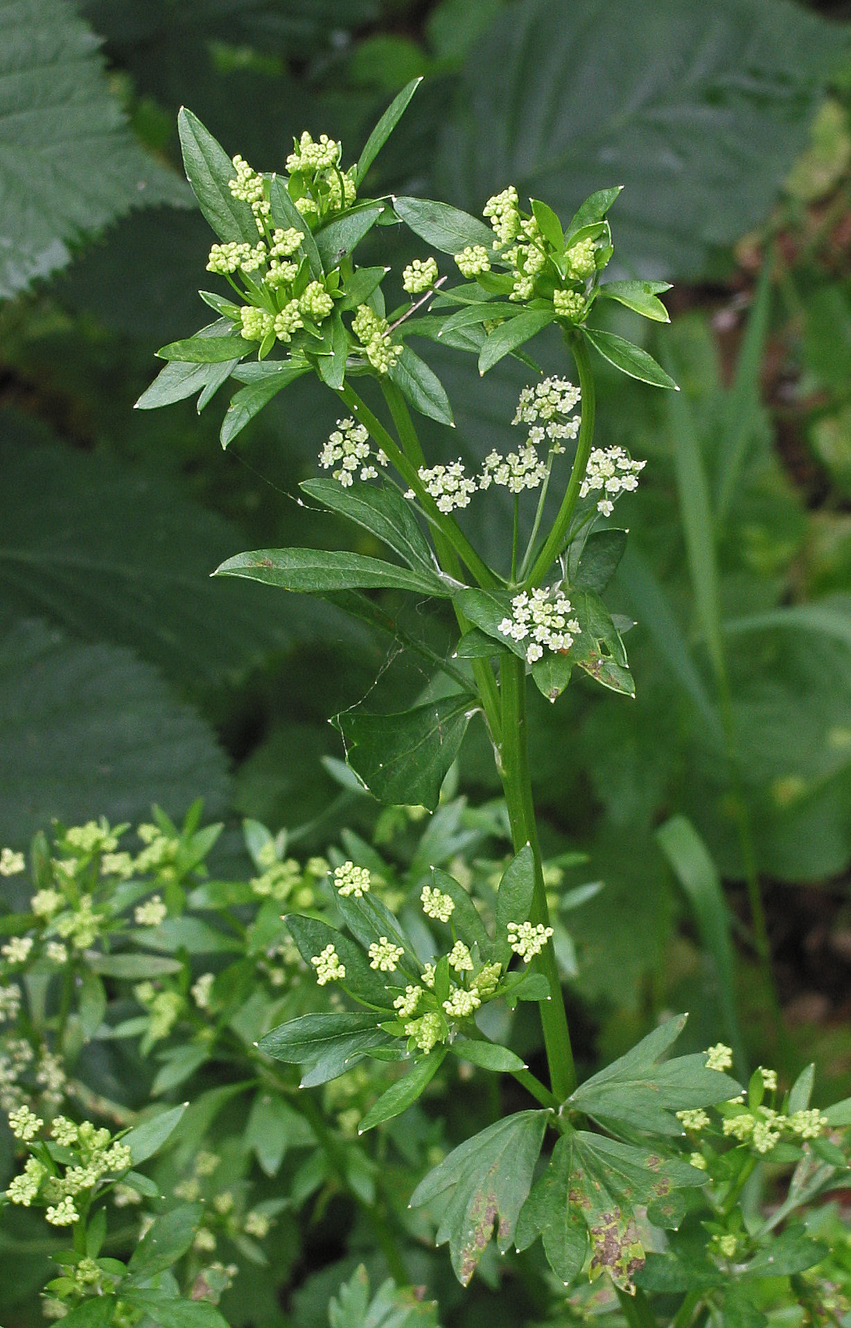 Apium graveolens var. rapaceum flowering (Knolselderij bloeiend}